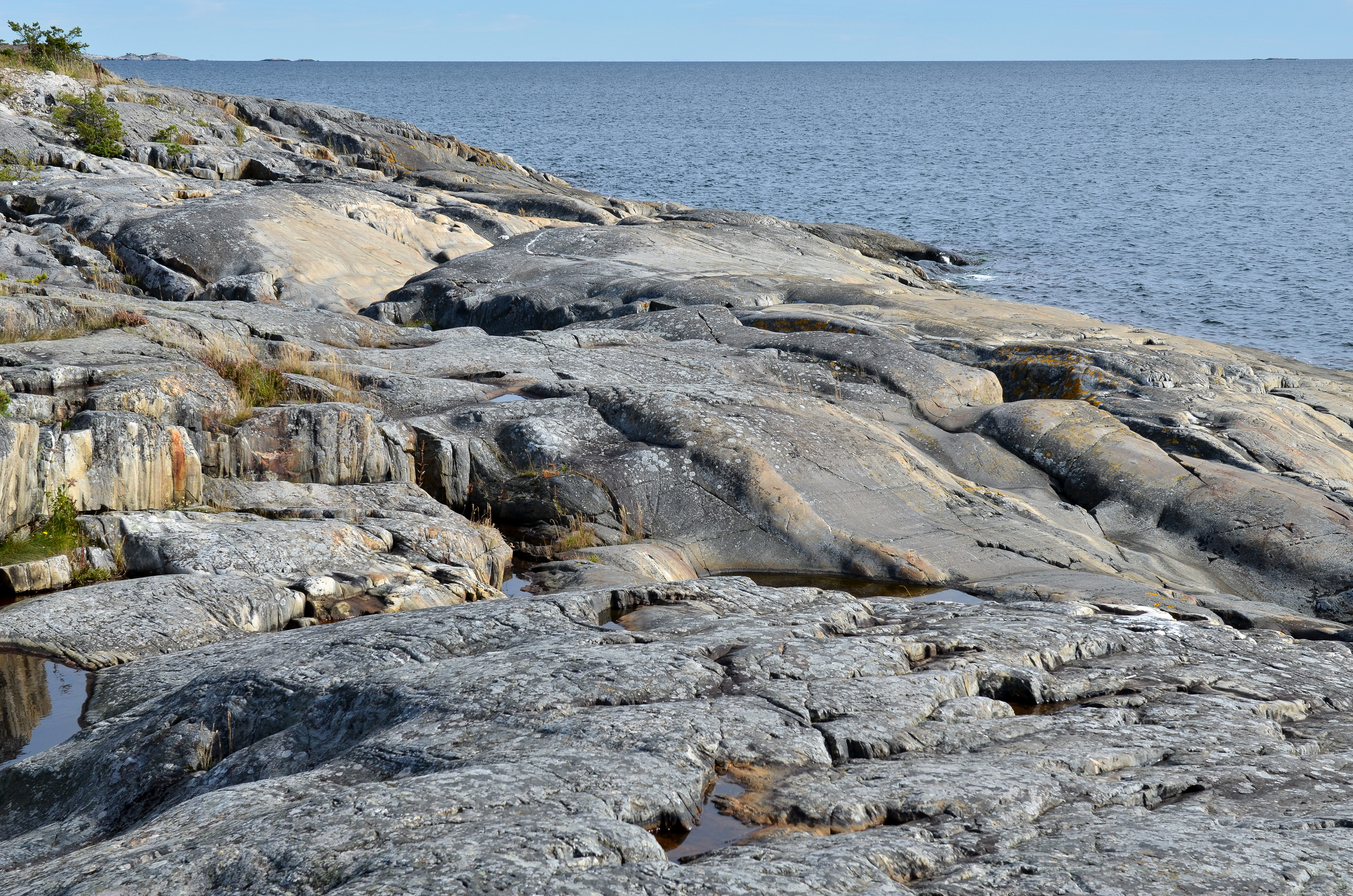 Cliffs with clear glacial striation from the last glacial period at Rävstaviken, Utö island, Haninge Municipality, Stockholm archipelago.